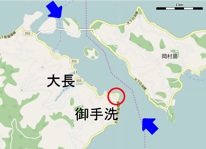 2015年現在の地図に御手洗地区を示したもの。 This map may be incomplete, and may contain errors. Don't rely solely on it for navigation.